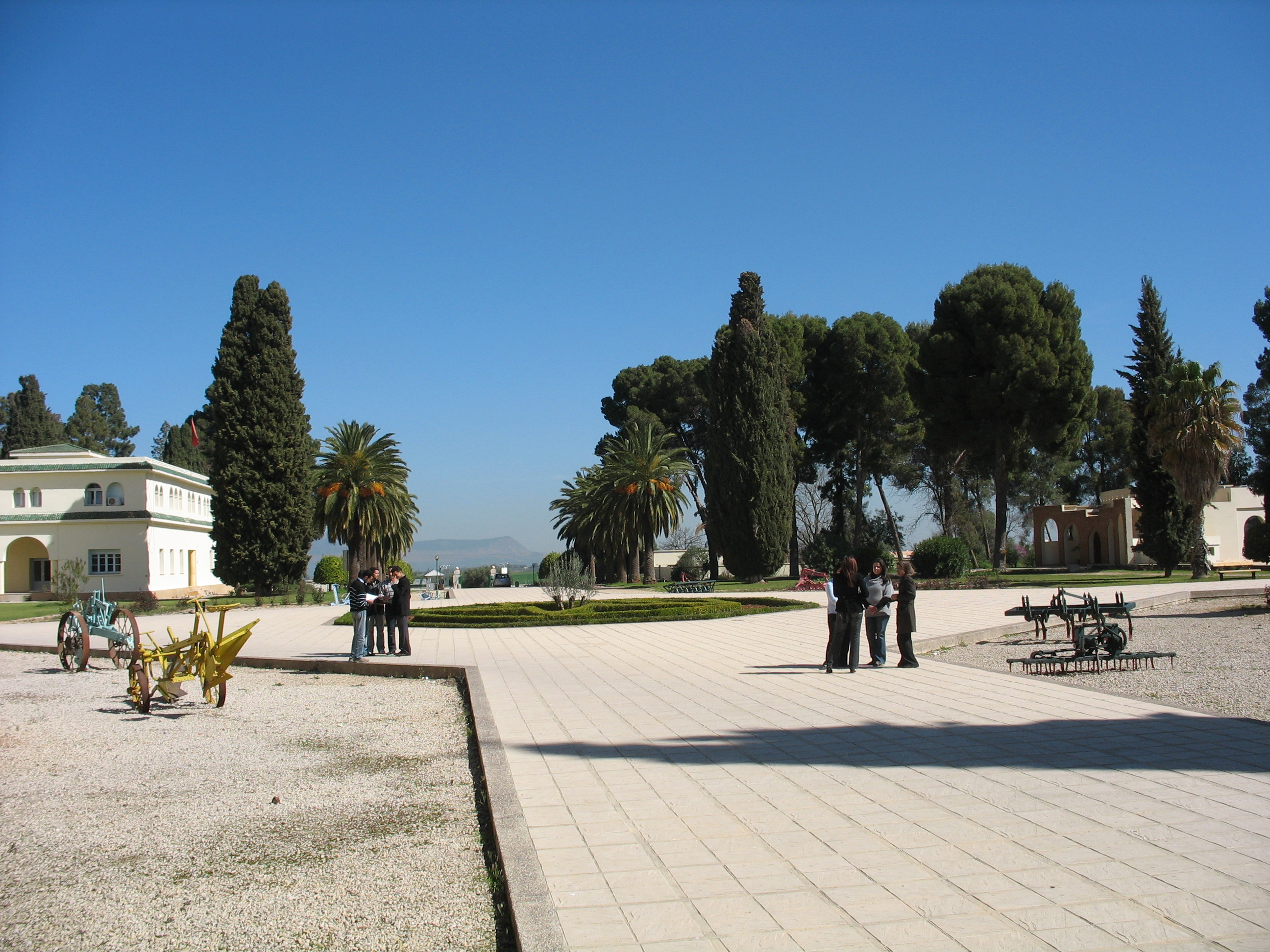 Cour principale de l'ENA de Meknès